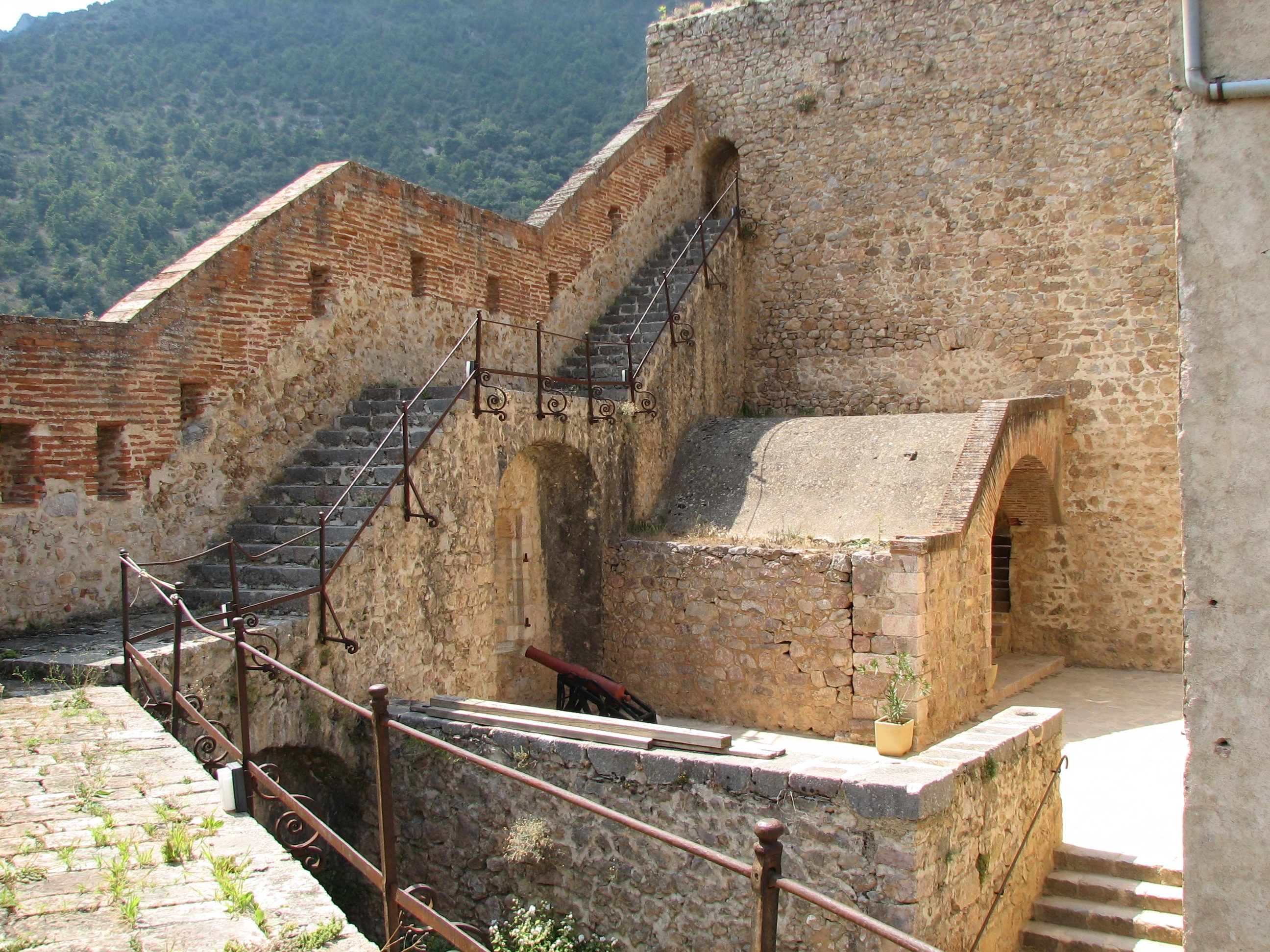 Fort Libéeria: Innenansicht der Brustwehr mit den mehr als 300 Jahre alten Eisengeländer